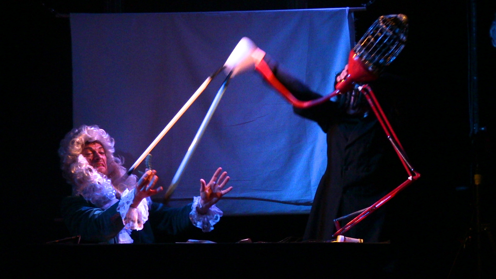 Les Fables de La Fontaine Tout à Trac ! « Le Héron » - Mise en scène : Nicole Charpentier, Christian Chabaud - Représentation au Théâtre de Nesle avec Nicolas Charentin et Pierre Ficheux (en alternance avec Philippe Pasquini)